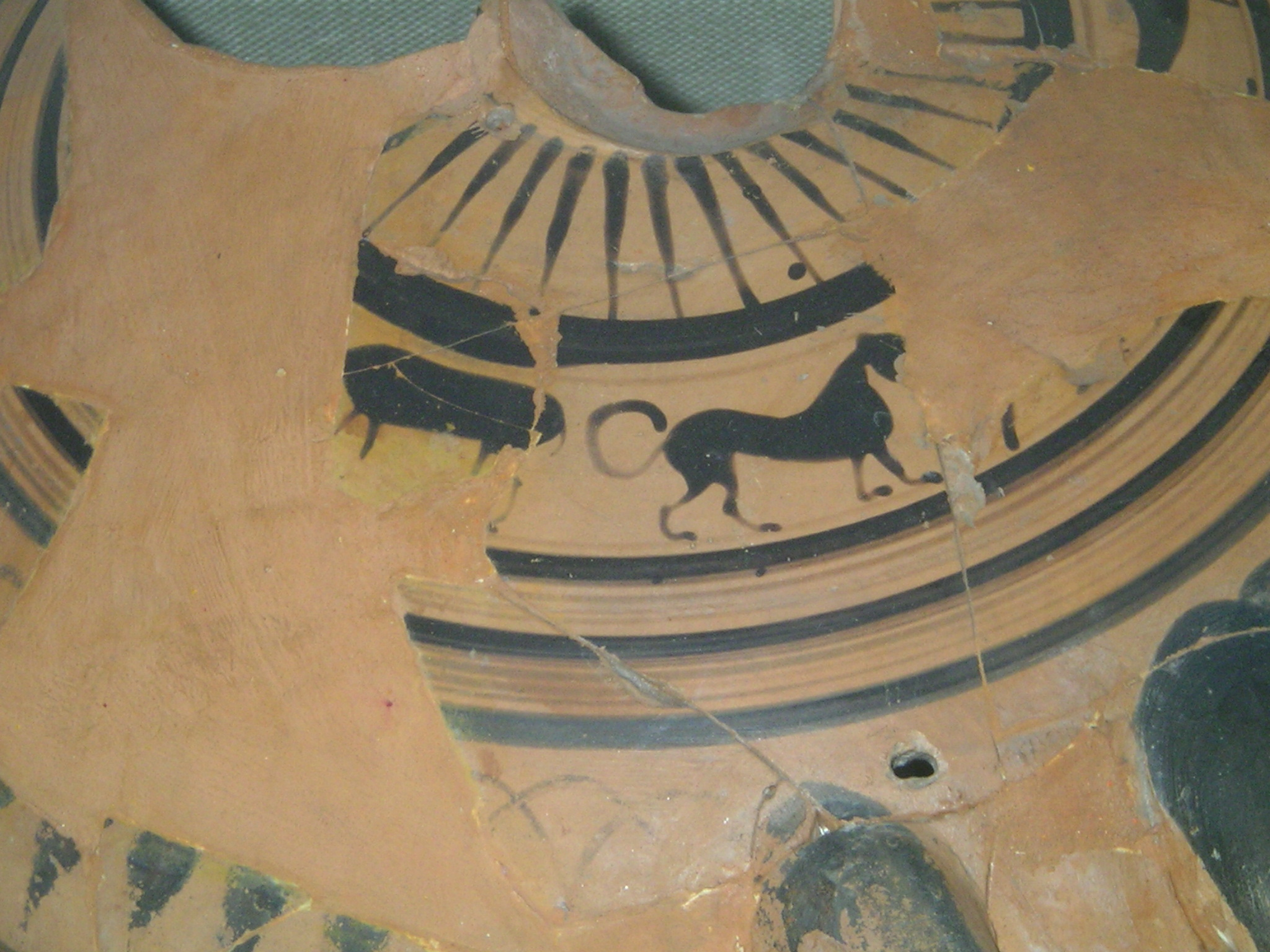 Fragment einer griechischen Schale, IV. Jahrhundert vor Christus, Fundort Monte Iato (Ietas). Antiquarium von San Cipirello